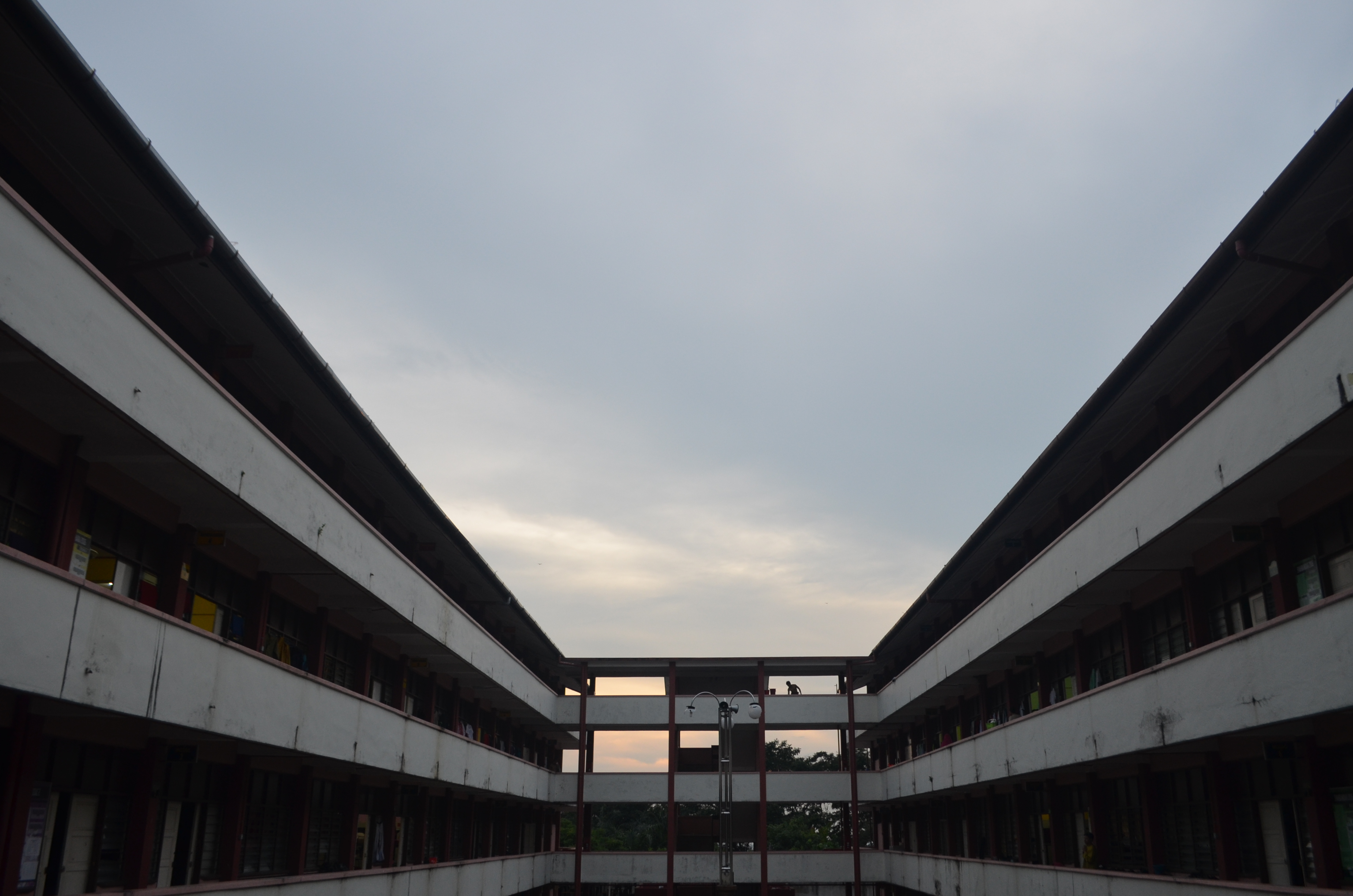 Copyright Protected Taken by Syaddad Nabil Shamsullah Victorious 1317